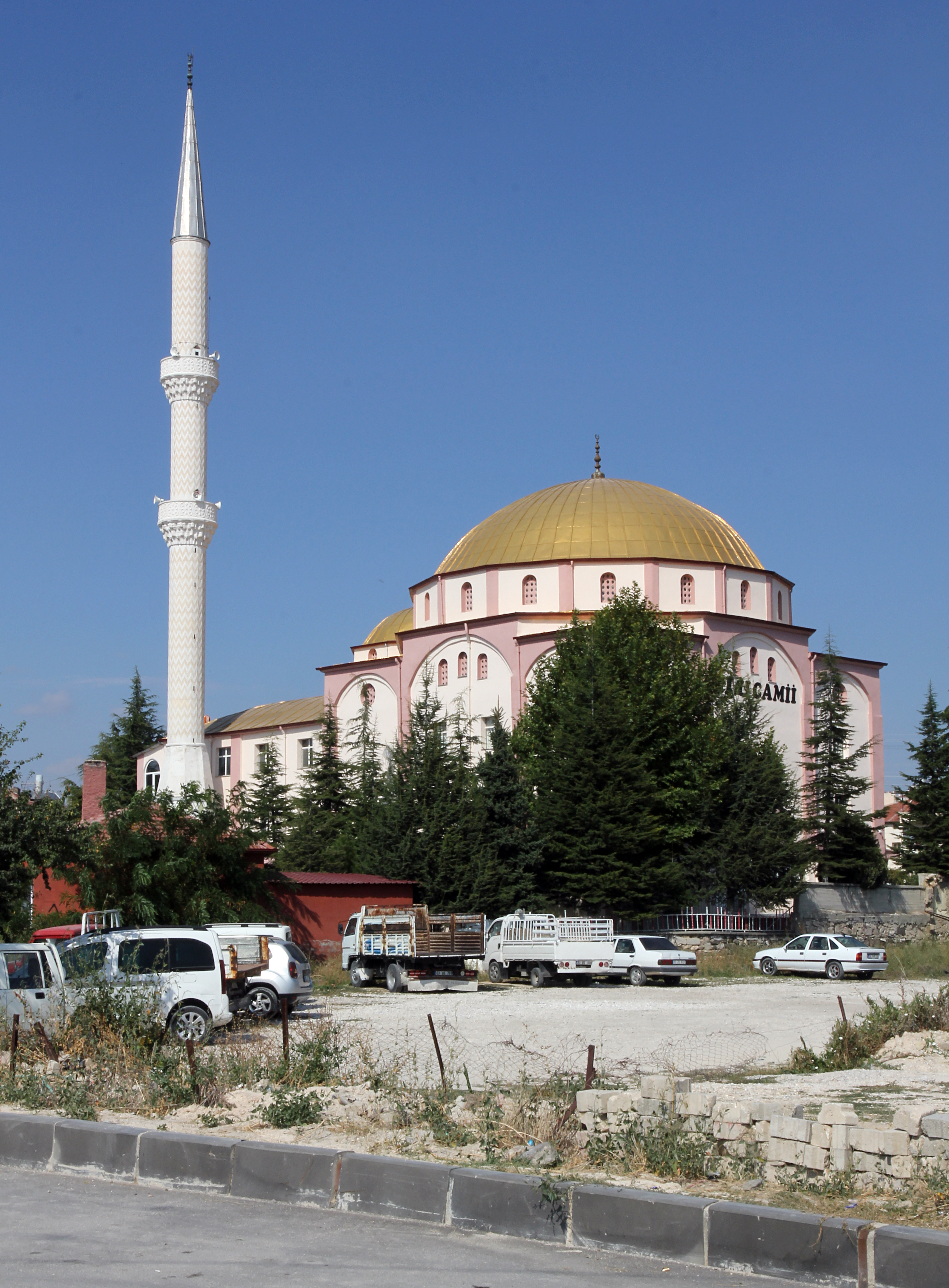 Moschee Ulu Cami in İscehisar, Kreisstadt in der zentraltürkischen Provinz Afyonkarahisar